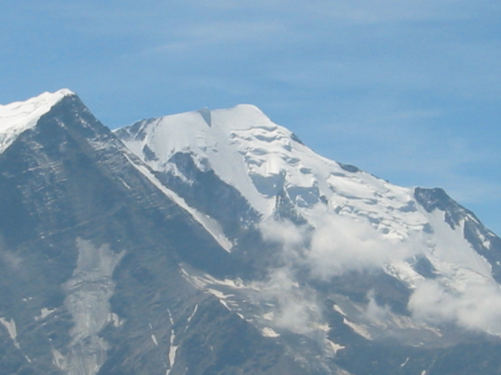 Aiguille de Bionnassay, Massif du Mont-Blanc, 2006.